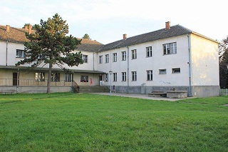 Основна школа